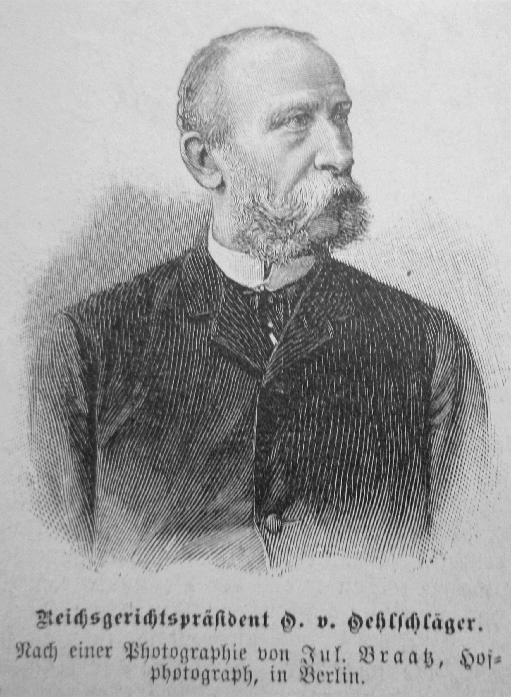 Reichspräsident Otto von Oehlschläger, Holzstich nach Fotografie von Julius Braatz